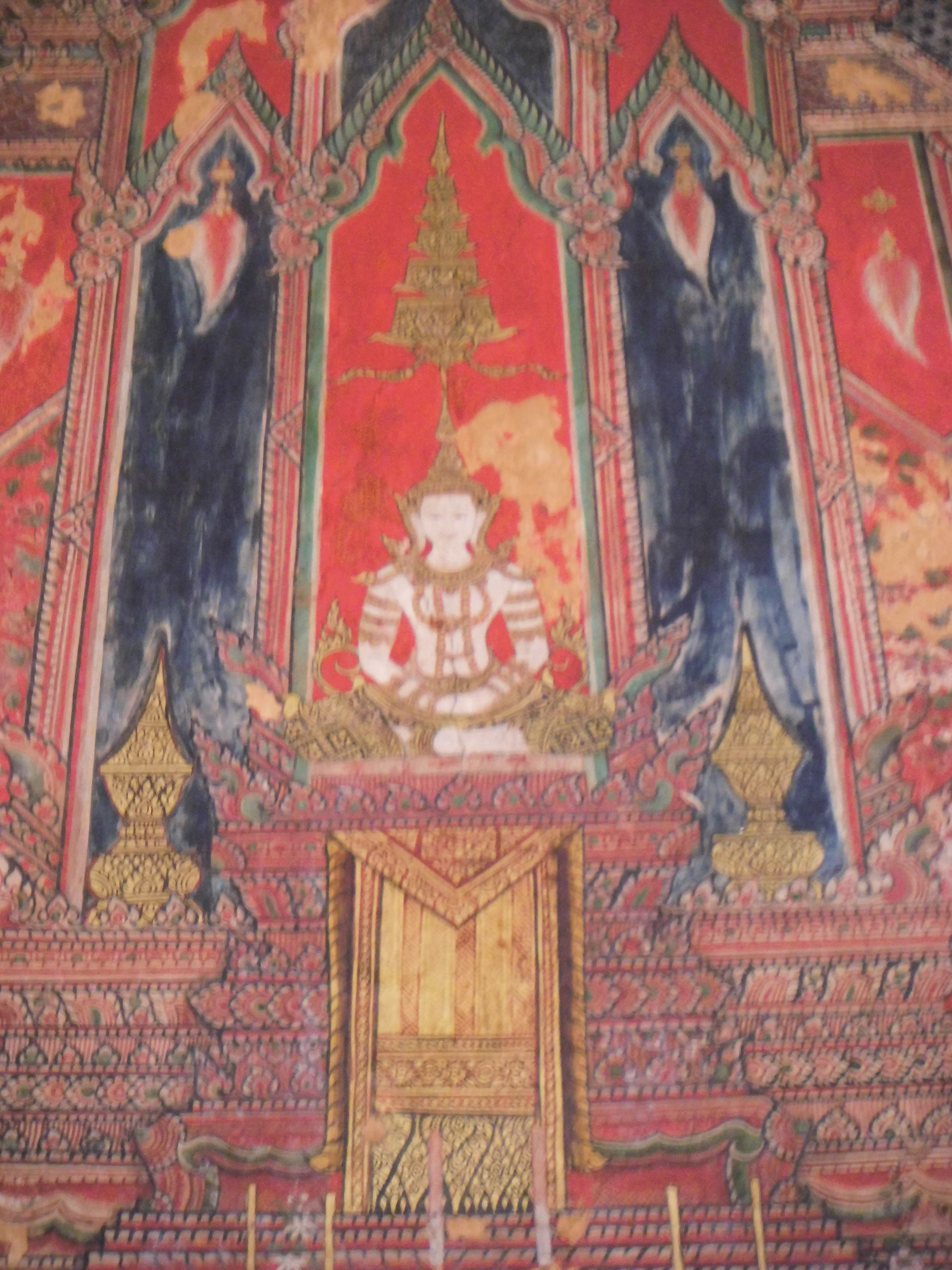 วัดสุวรรณาราม